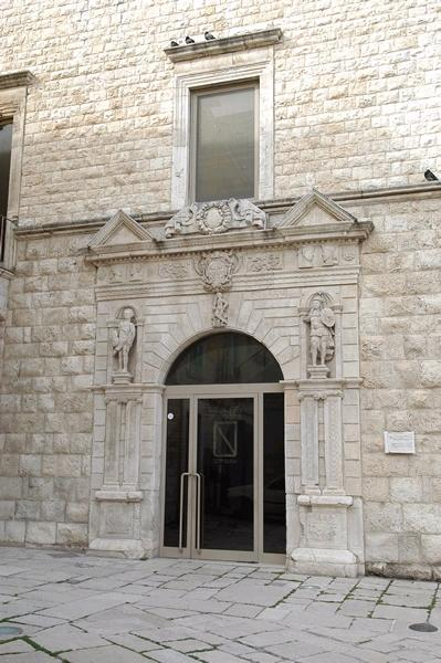 Immagine tratta dal sito Molfetta.live. Autorizzazione all'uso concessa, previa citazione della fonte. OTRS #2007061810004126